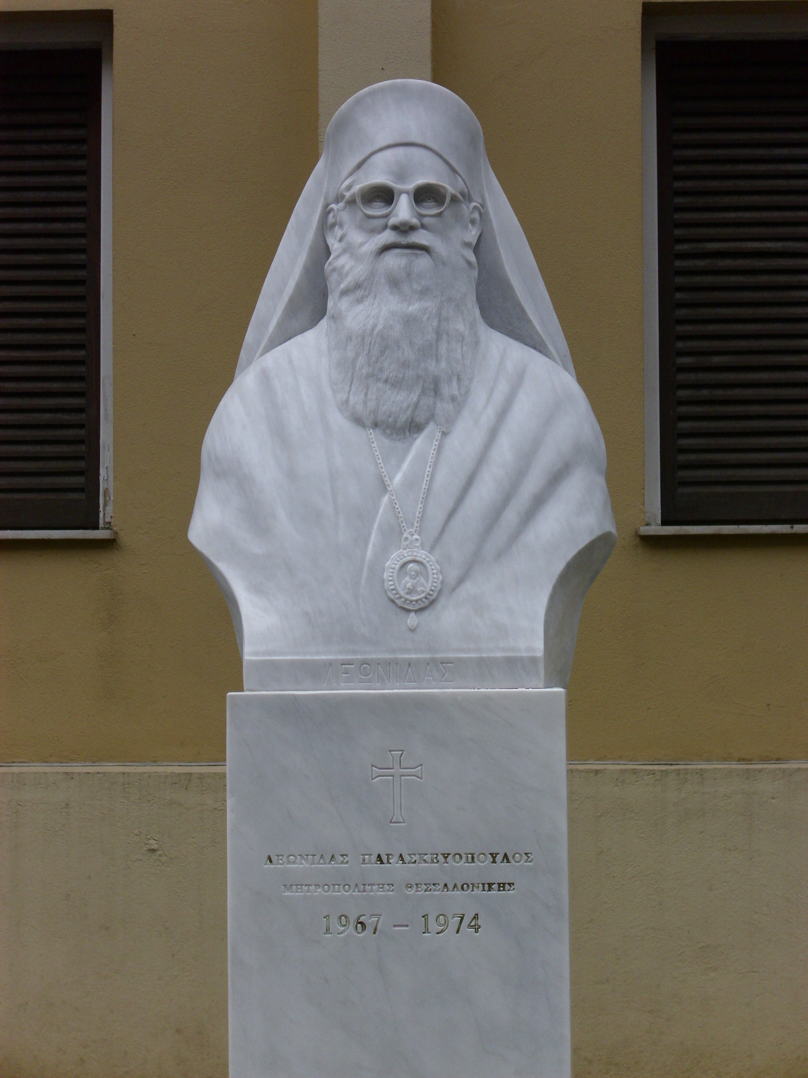 Статуя на солунския митрополит Леонидас Параскевопулос в Солун.